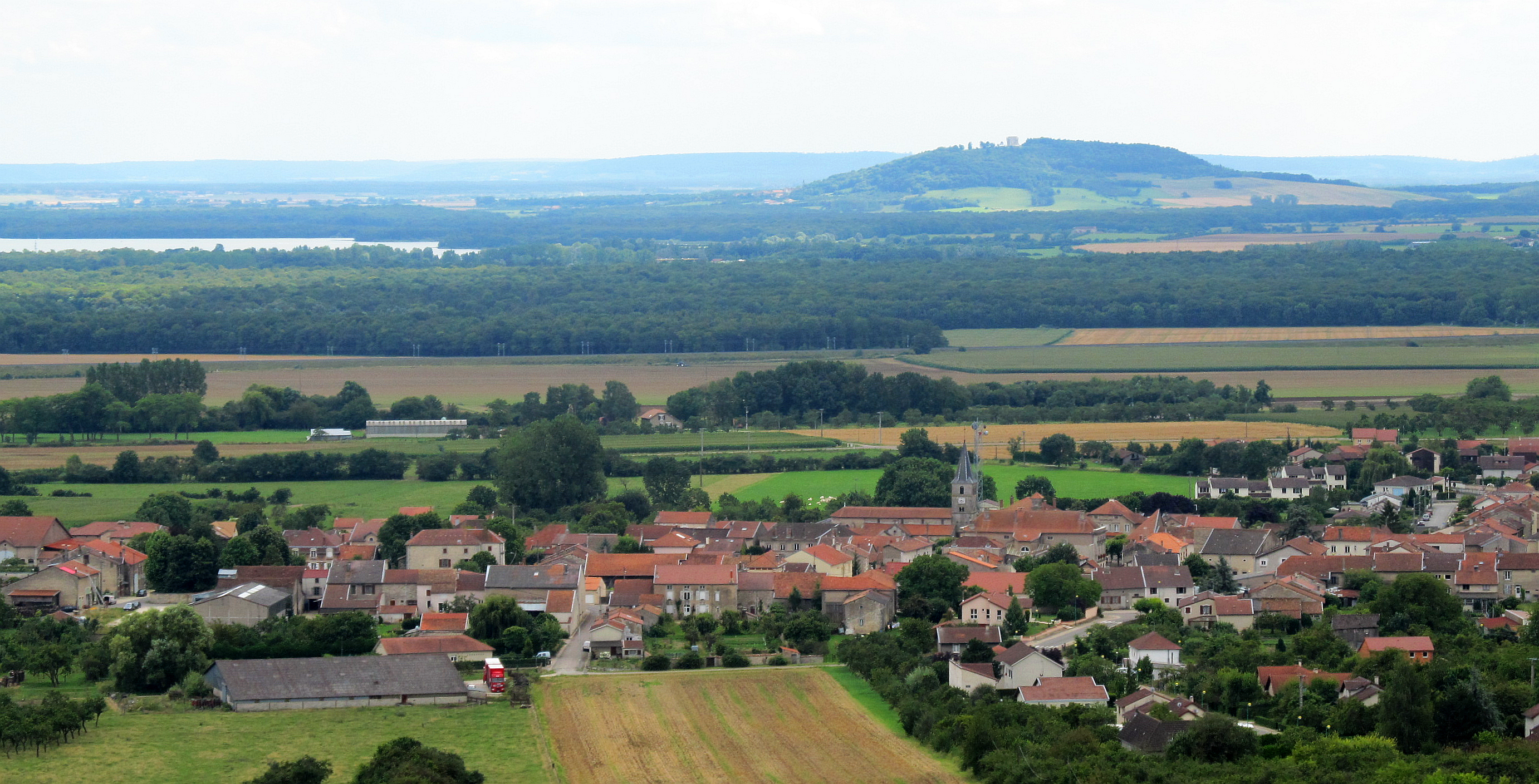 Vigneulles-lès-Hattonchâtel depuis Hattonchâtel